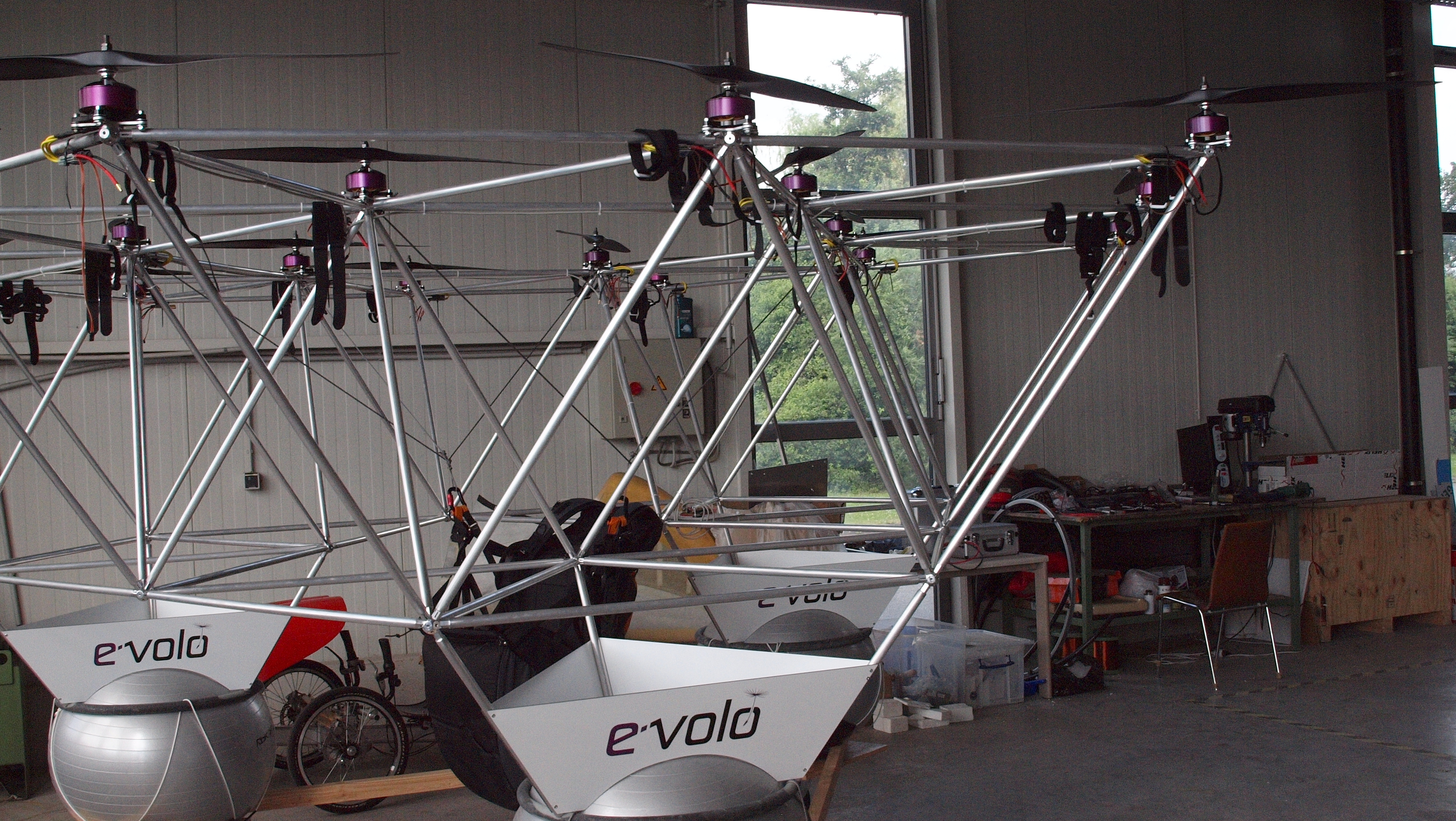 Volocopter der Firma E-Volo, Prototyp